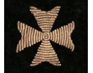 Distintivo del Cuerpo de Sanidad de la Armada (Cruz de Malta)